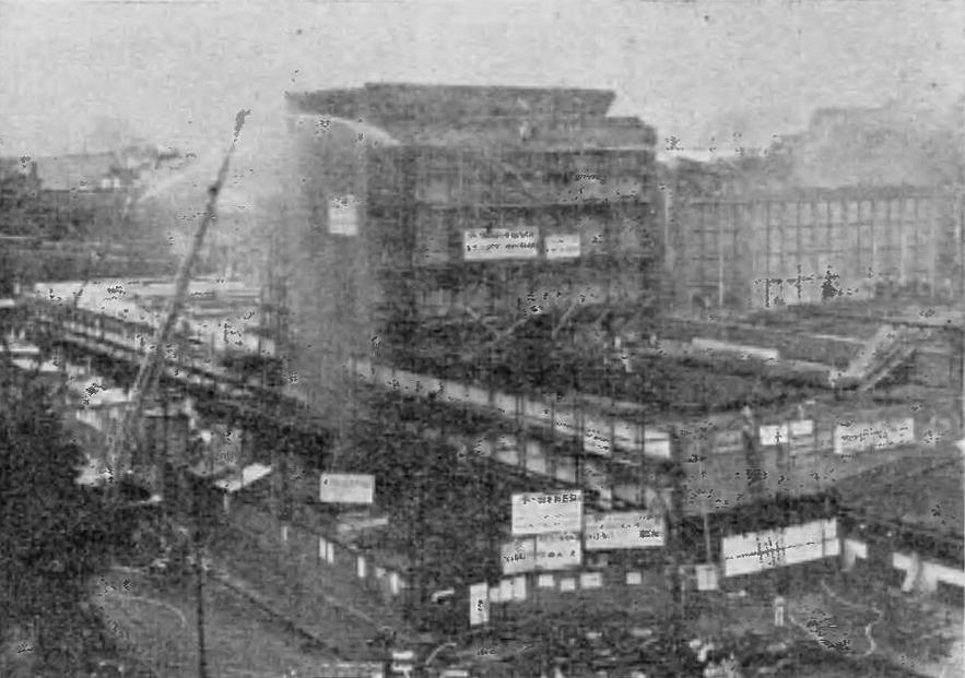 Pożar dworca głównego w Warszawie (1939)